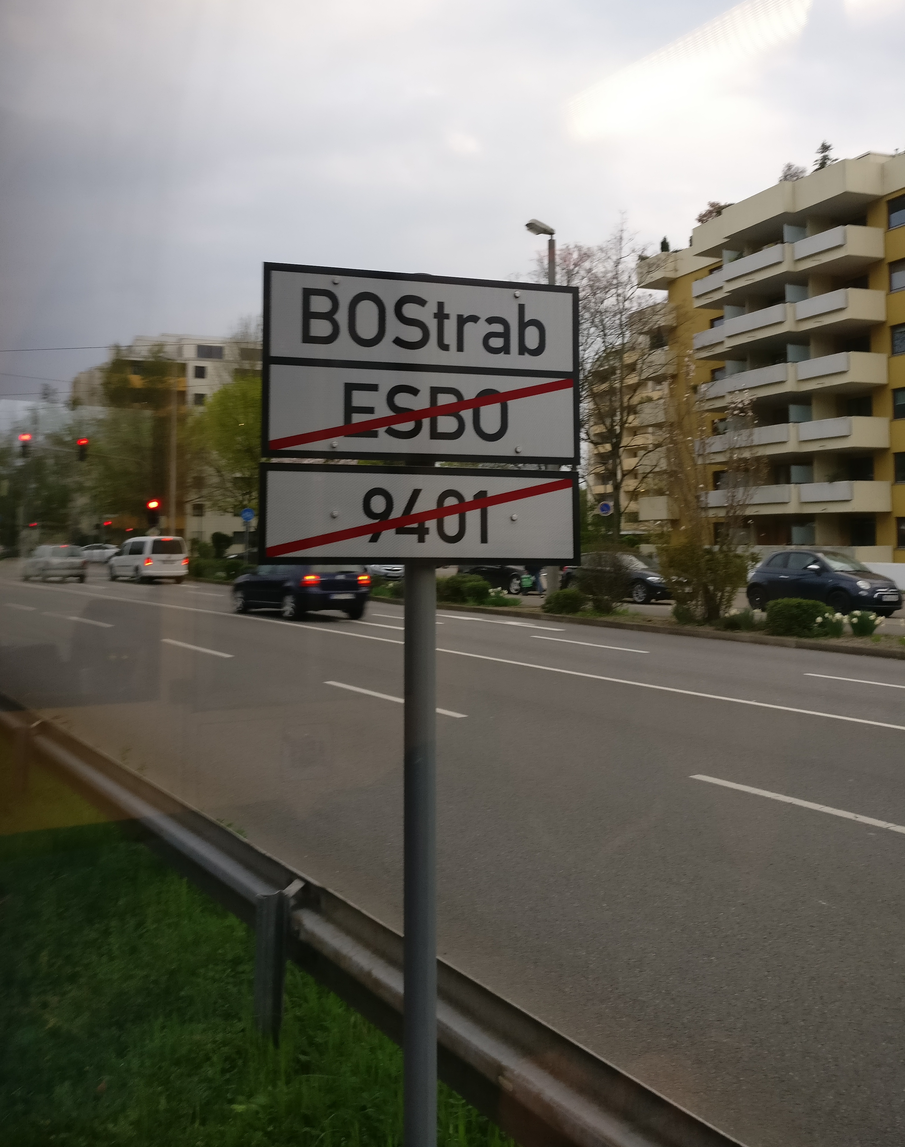 Schild Ende der Geltung ESBO auf der RNV-Linie 5 (OEG) bei haltestelle Burgstraße